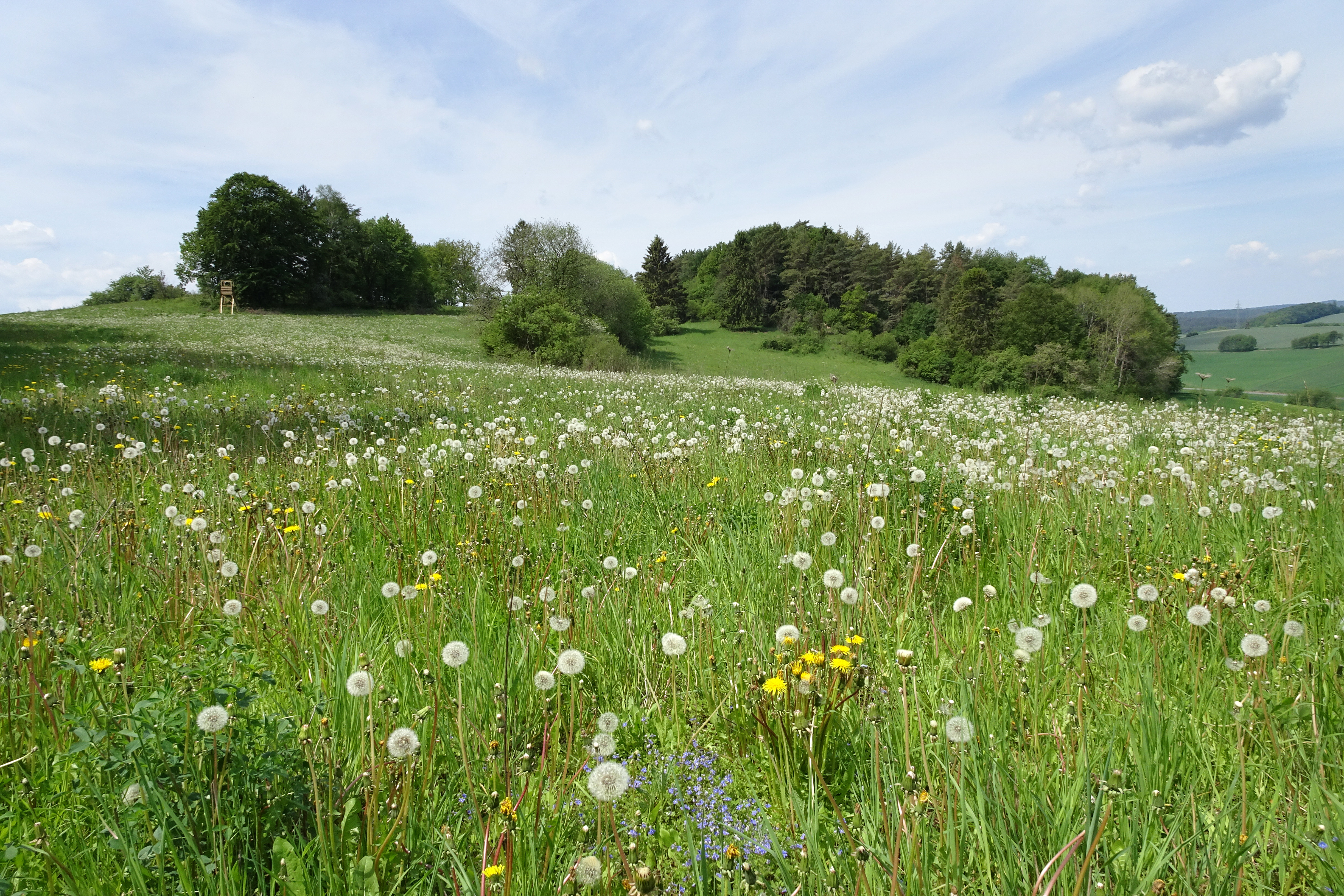 Das Naturschutzgebiet „Wacholderberg und Schmiedsberg bei Dens“ liegt südlich des Ortsteils Dens der Gemeinde Nentershausen im osthessischen Landkreis Hersfeld-Rotenburg. Durch die Nutzung als Hute haben sich auf den flachgründigen Böden die schutzwürdigen Kalk-Halbtrockenrasen ausgebildet. Mit weiteren Halbtrockenrasenflächen der Umgebung gehört es teilweise zu dem Flora-Fauna-Habitat-Gebiet „Kalkmagerrasen zwischen Morschen und Sontra“. Die kulturhistorische Bedeutung des Schutzgebiets begründen die Relikte früherer Landnutzungsformen, deren Strukturen noch in den Bereichen der Kalktrockenrasen, Wacholderheiden und Mähwiesen zu erkennen sind.